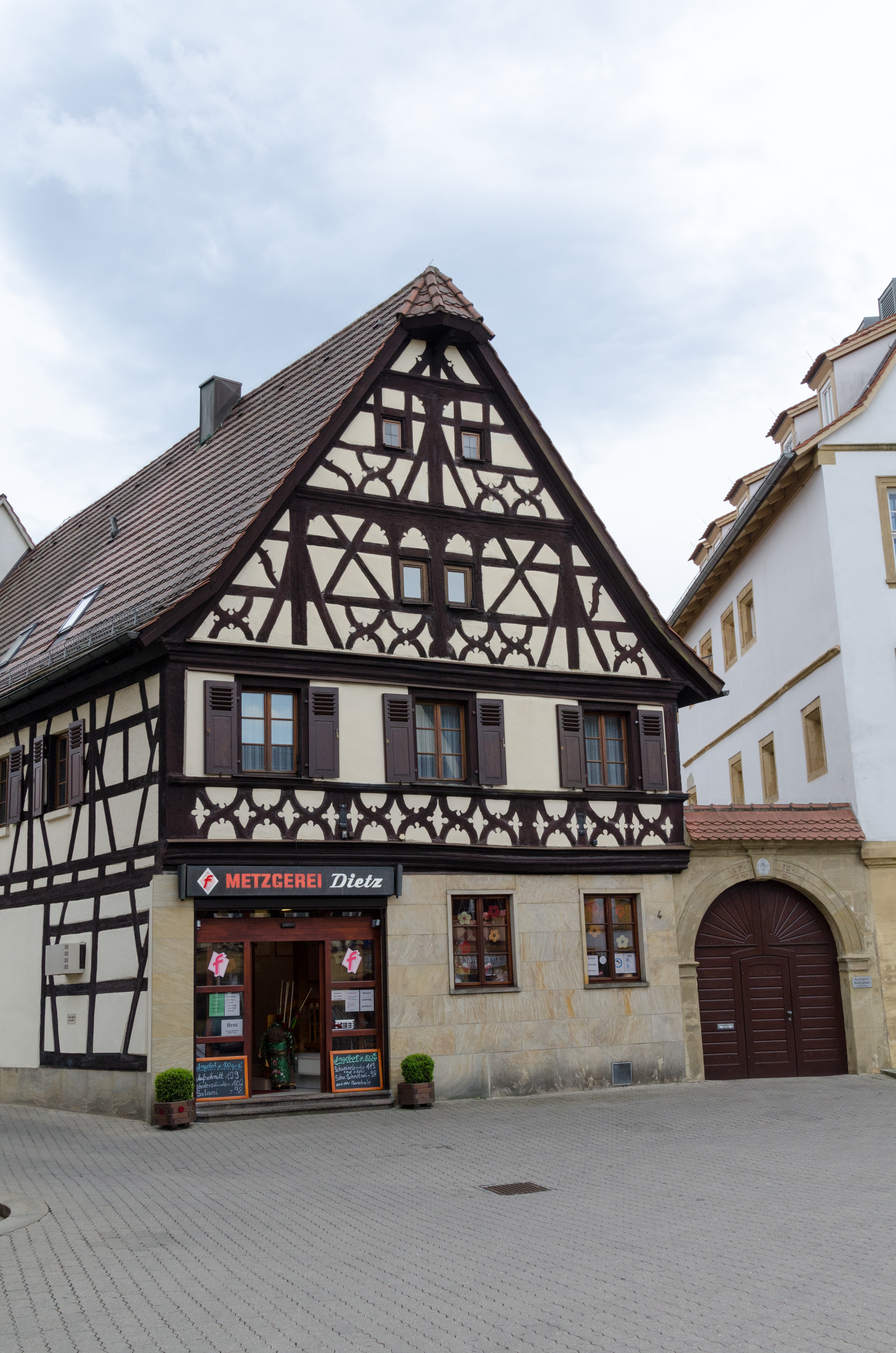 Hallstadt, Marktplatz 4